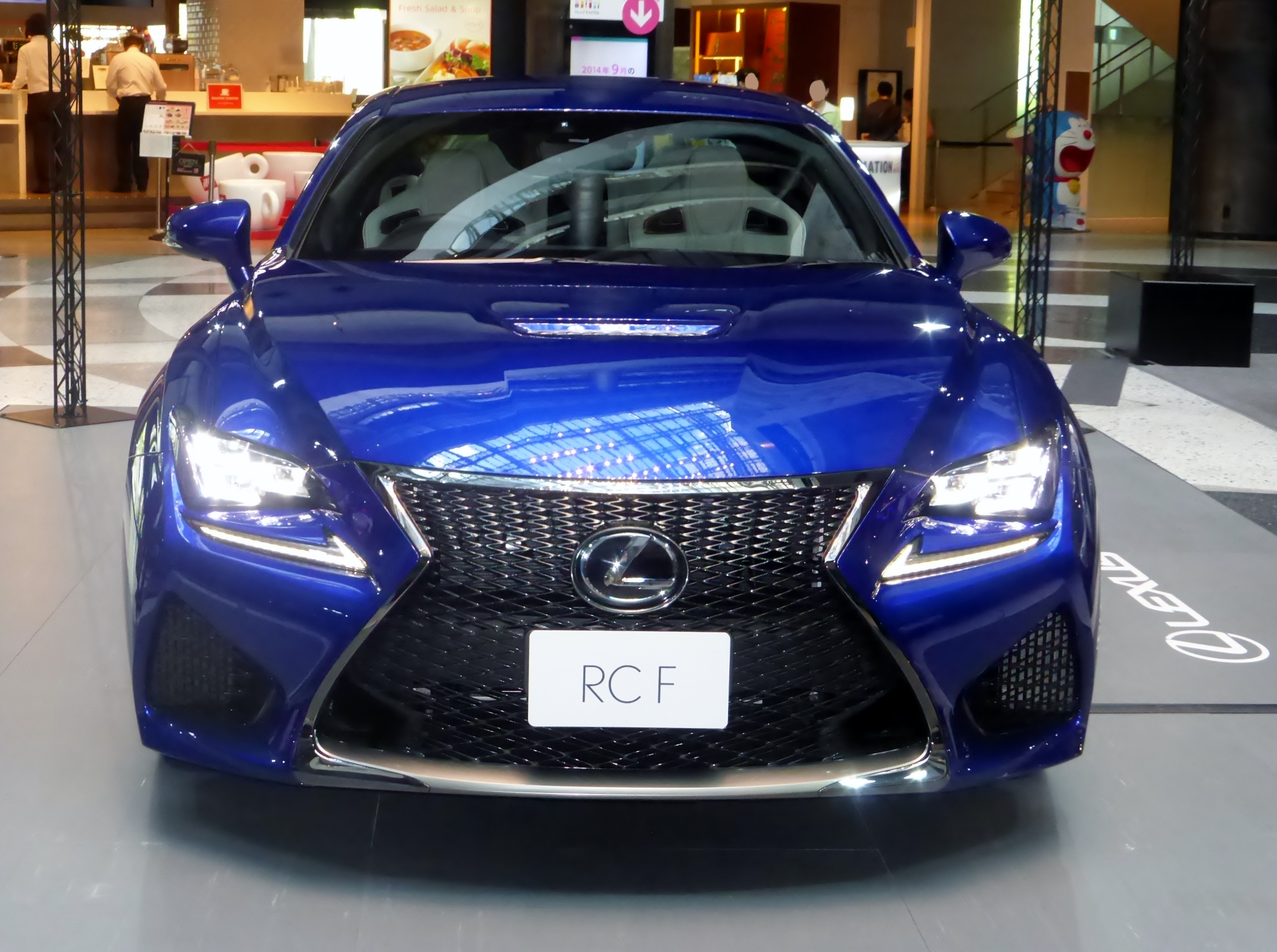 レクサス・RC Fのプロトタイプをフロントから撮影。